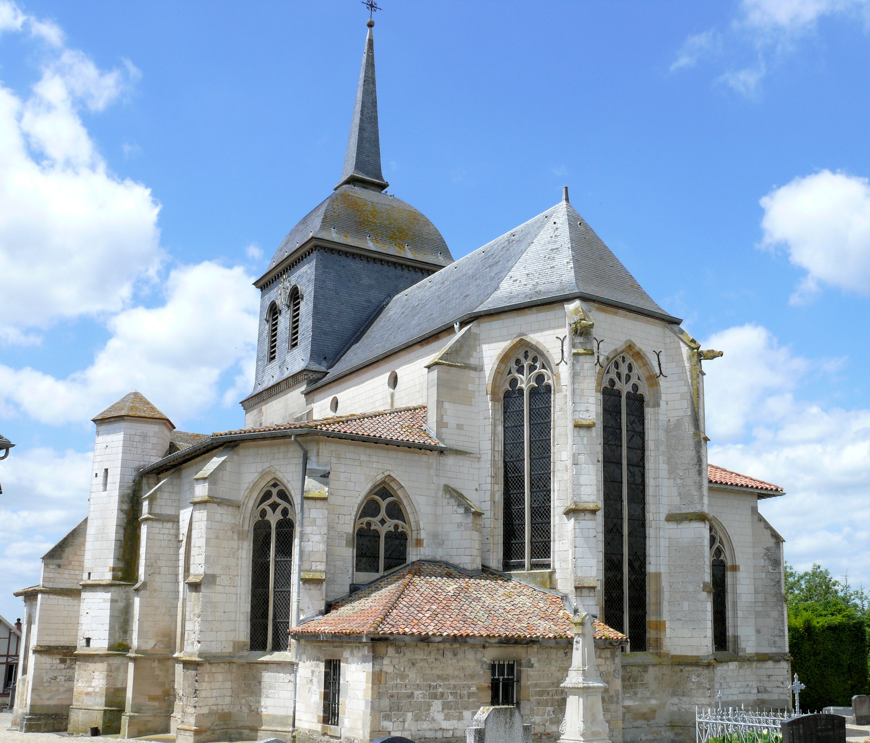 Pogny - Eglise de la Nativité-de-la-Vierge